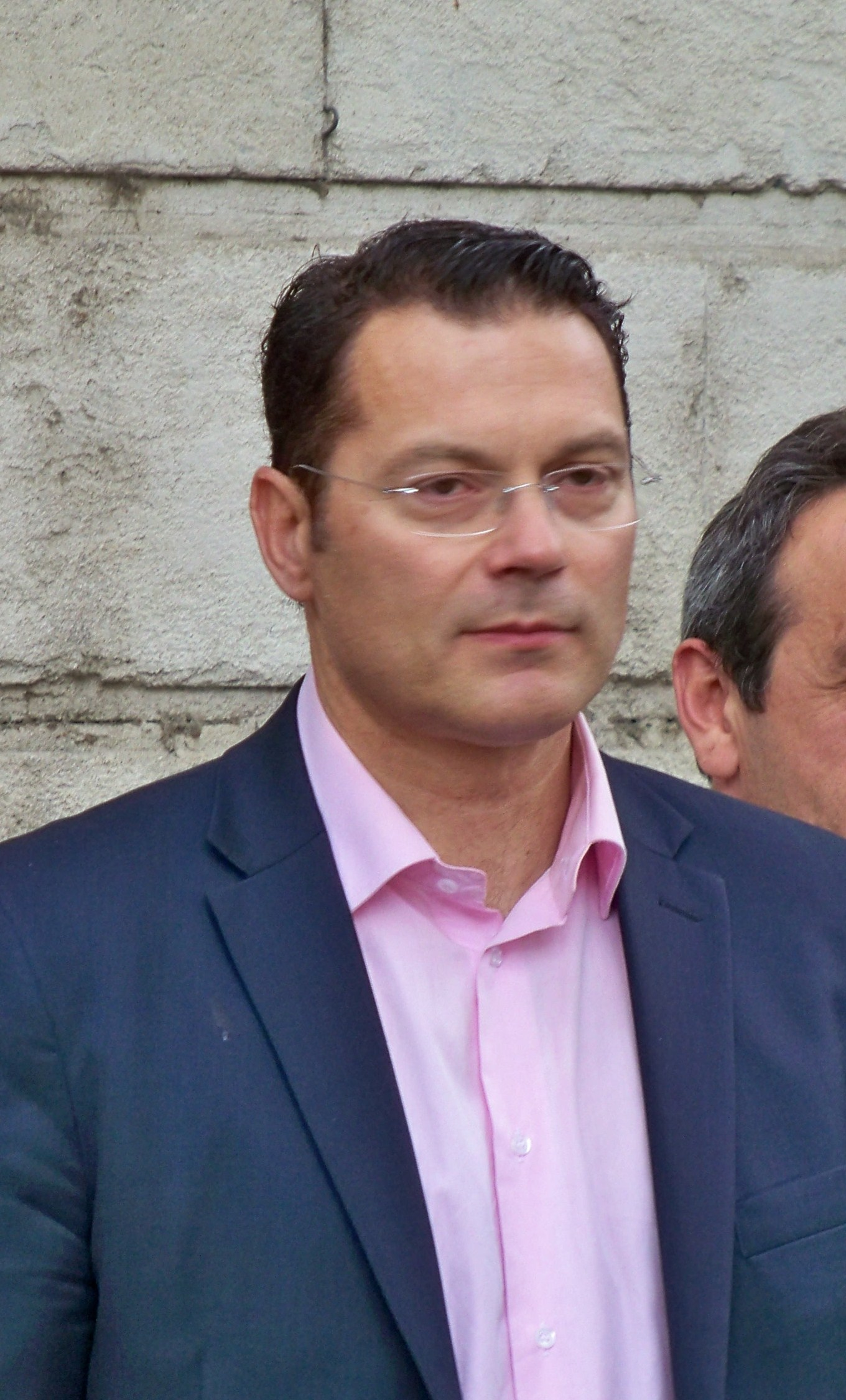 Francis Adolphe, Mairie de Carpentras, lors de la fête de la fraise de Carpentras (84)